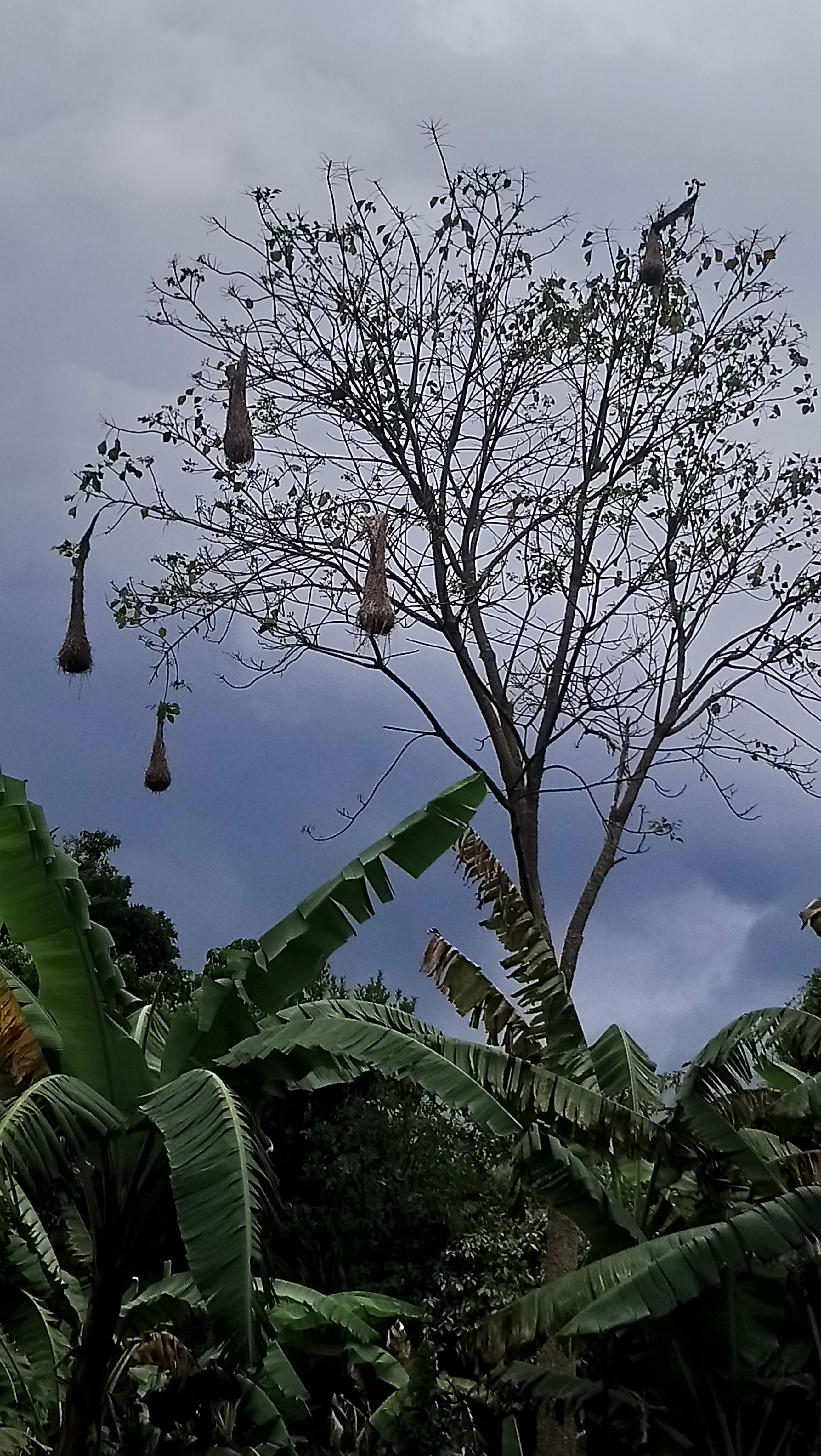 Nidos colgantes de uchi u oropéndolas en Dorado Chico, Yungas de La Paz, Bolivia